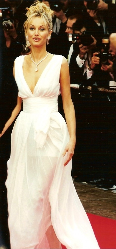 Adriana Karembeu, mannequin et présentatrice télévisée.